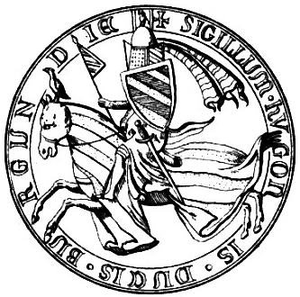 Hugo V. Burgundský